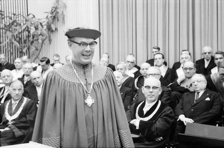 Freiburg: Audimax, Rektoratsübergabe, Professoren, Antrittsansprache Magnifizenz Prof. Mitscherlich